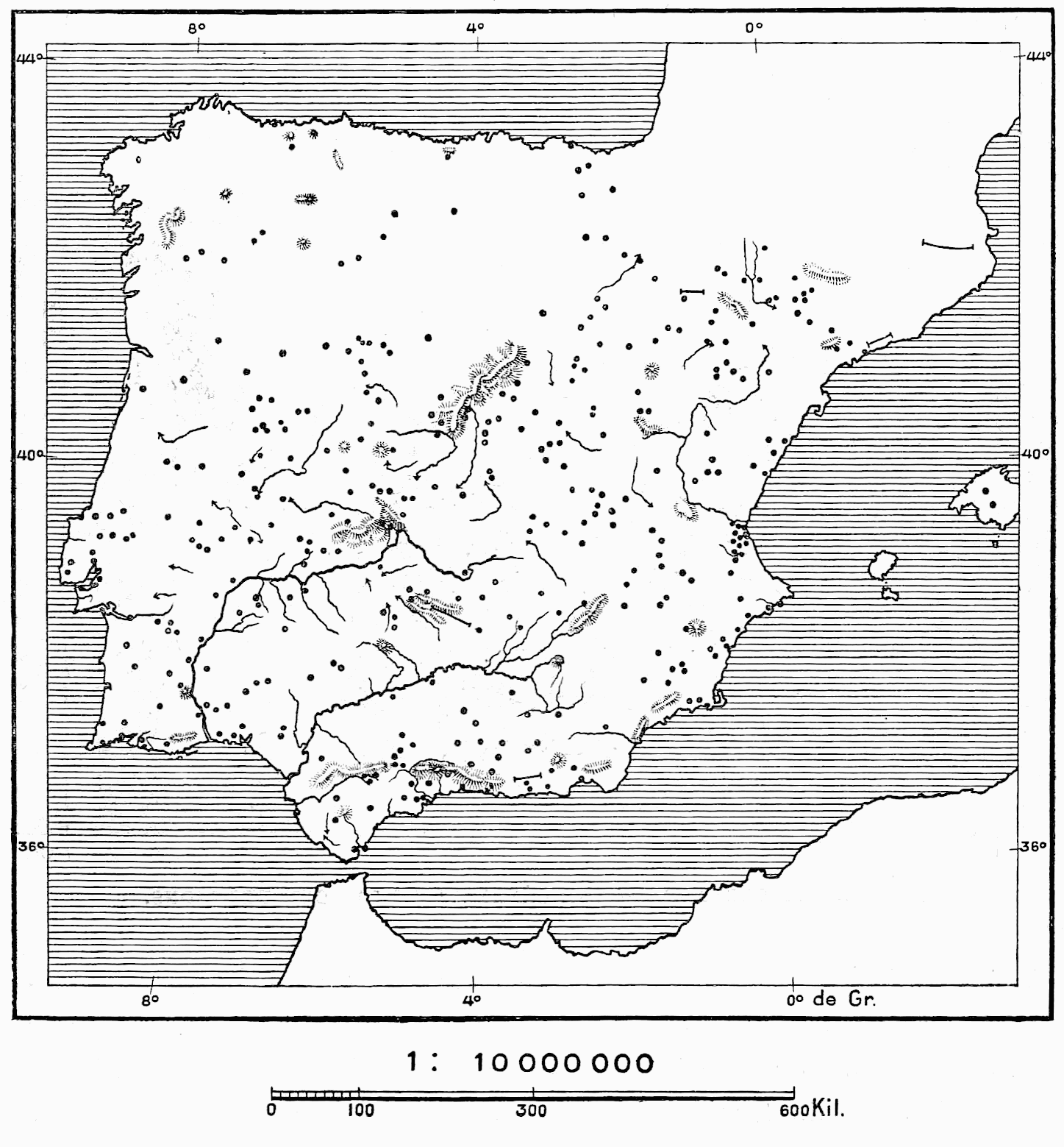 Toponymie arabe en Espagne